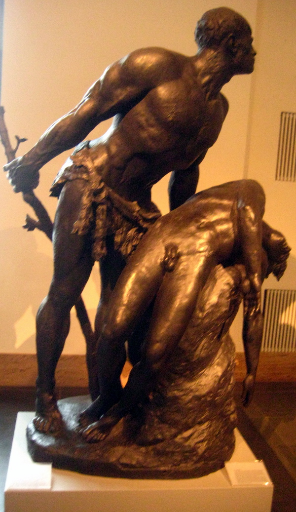 "Kain und Abel" von Reinhold Begas, 1895, Bronze Deutsches Historisches Museum, Berlin, Germany